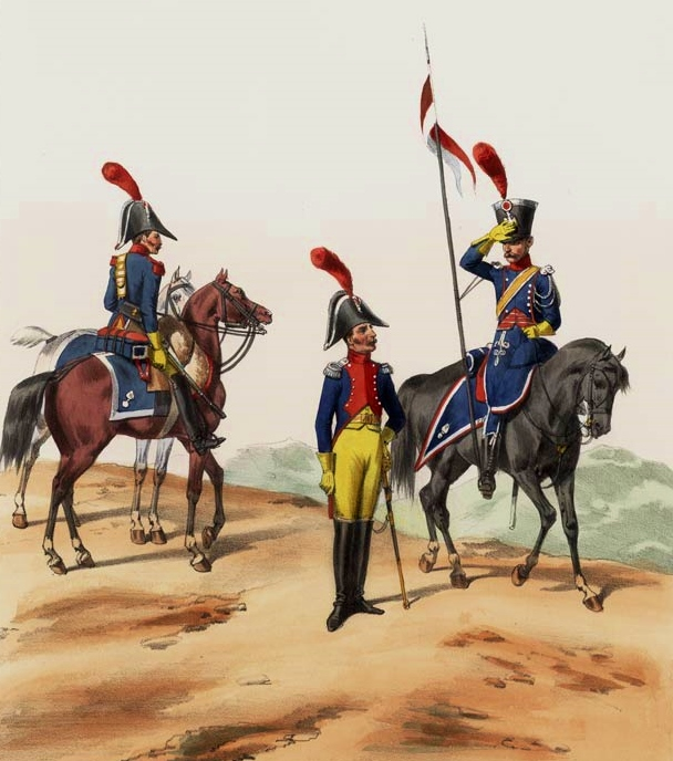 Gendarmerie française d'Espagne, de gauche à droite : gendarme à cheval, officier, lancier-gendarme.